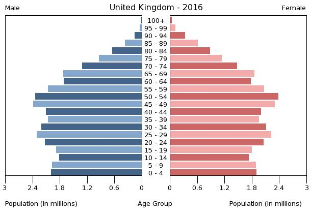 A population pyramid illustrates the age and sex structure of a country's population and may provide insights about political and social stability, as well as economic development. The population is distributed along the horizontal axis, with males shown on the left and females on the right. The male and female populations are broken down into 5-year age groups represented as horizontal bars along the vertical axis, with the youngest age groups at the bottom and the oldest at the top. The shape of the population pyramid gradually evolves over time based on fertility, mortality, and international migration trends.